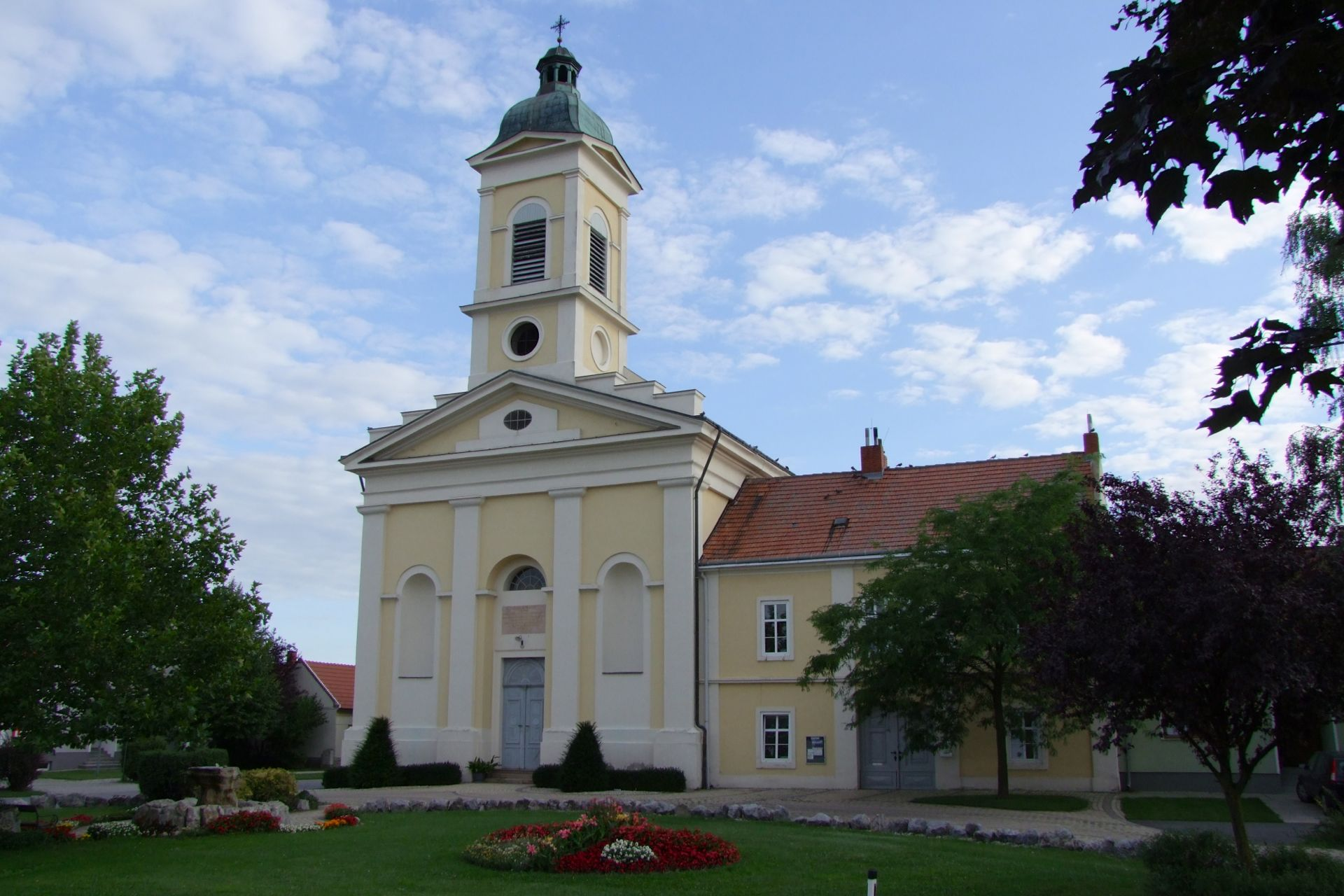 Evang. Pfarrkirche A.B.